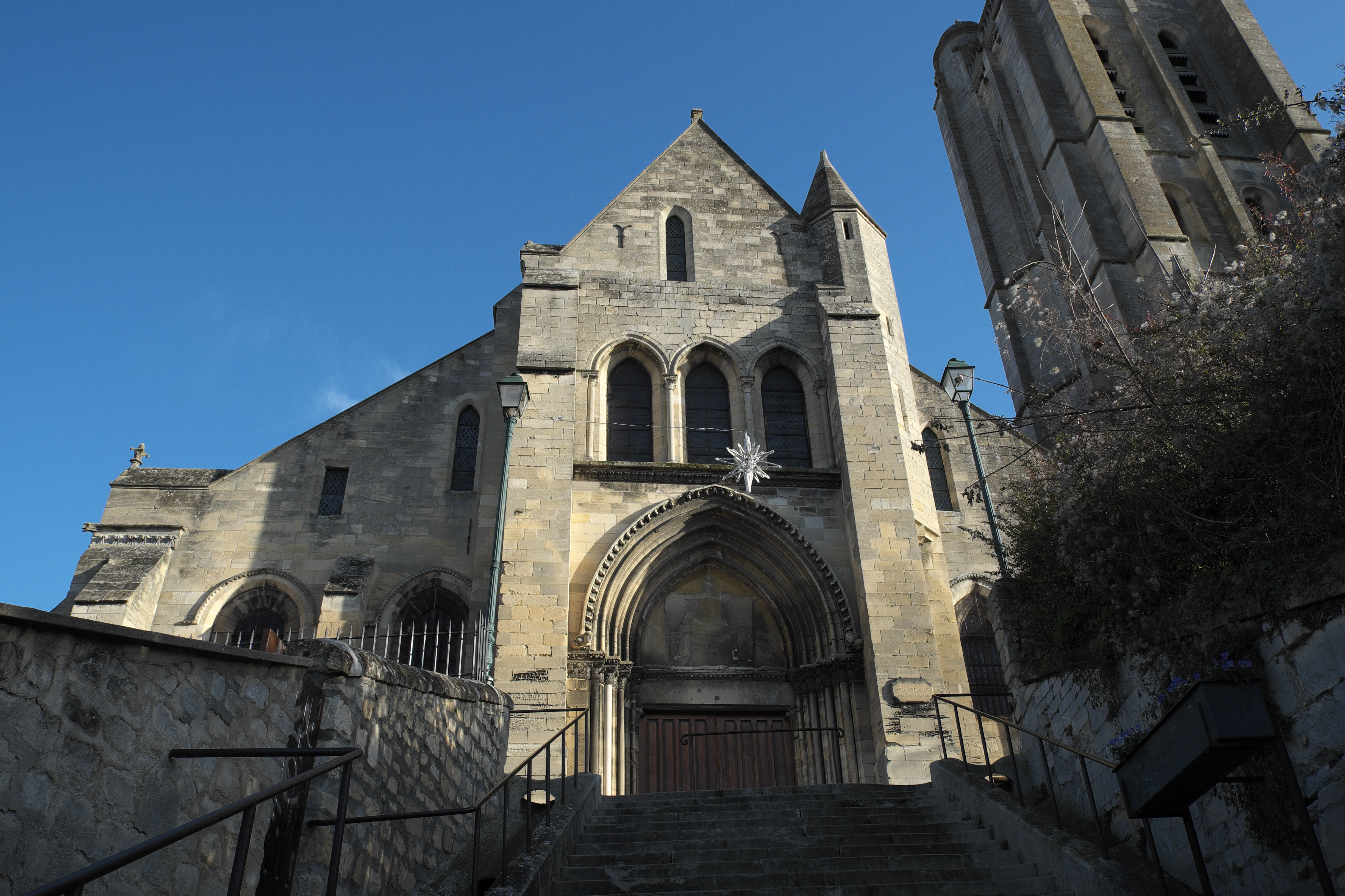 Katholische Pfarrkirche Saint-Laurent in Beaumont-sur-Oise im Département Val d'Oise (Île-de-France/Frankreich), Westfassade